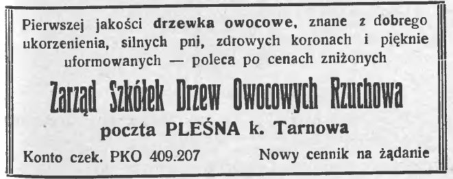 Ogłoszenie z 1936 roku. Szkółka Aleksandra Chilewskiego. Rzuchowa koło Tarnowa.